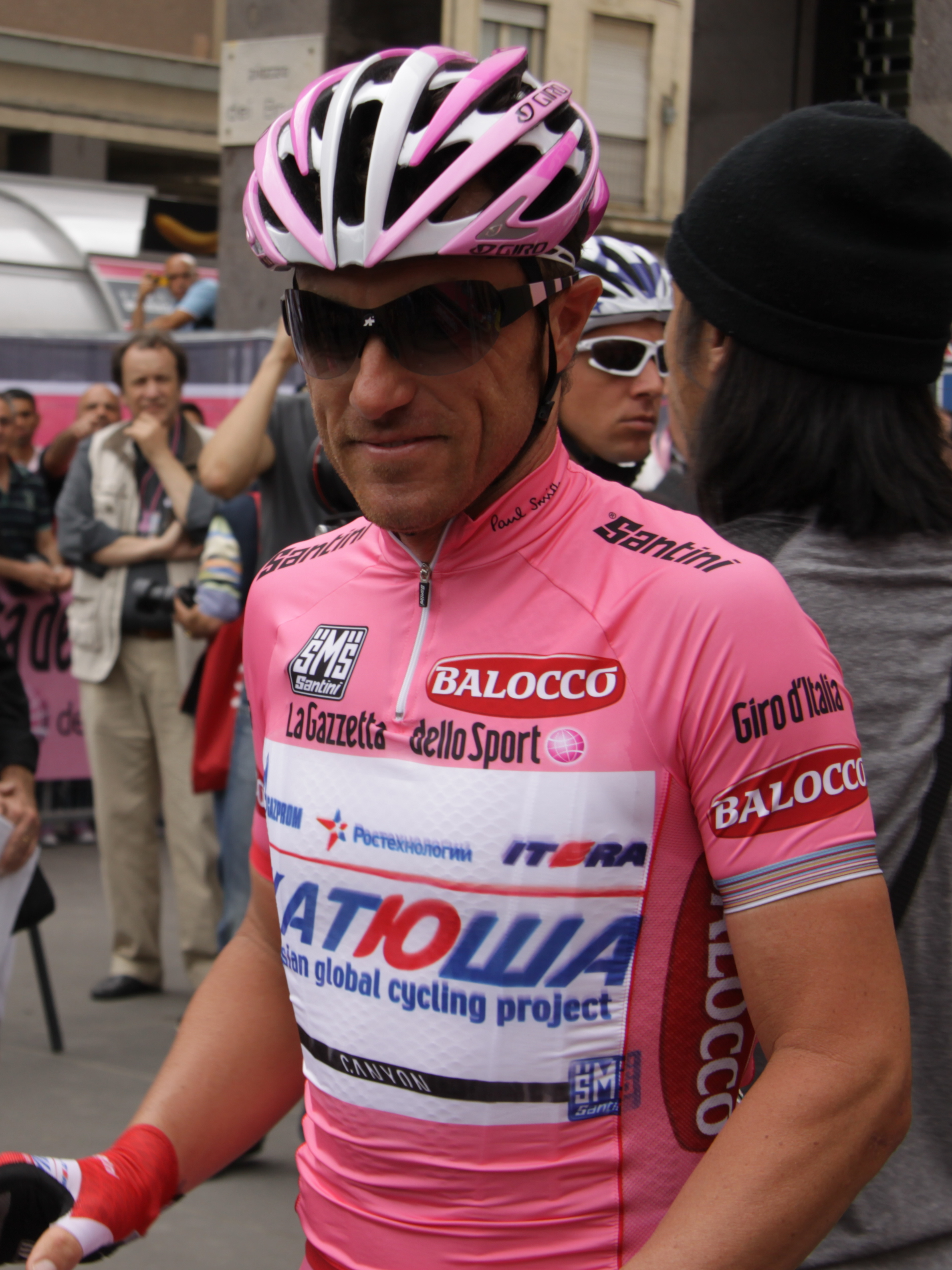 Luca Paolini al Giro d'Italia 2013